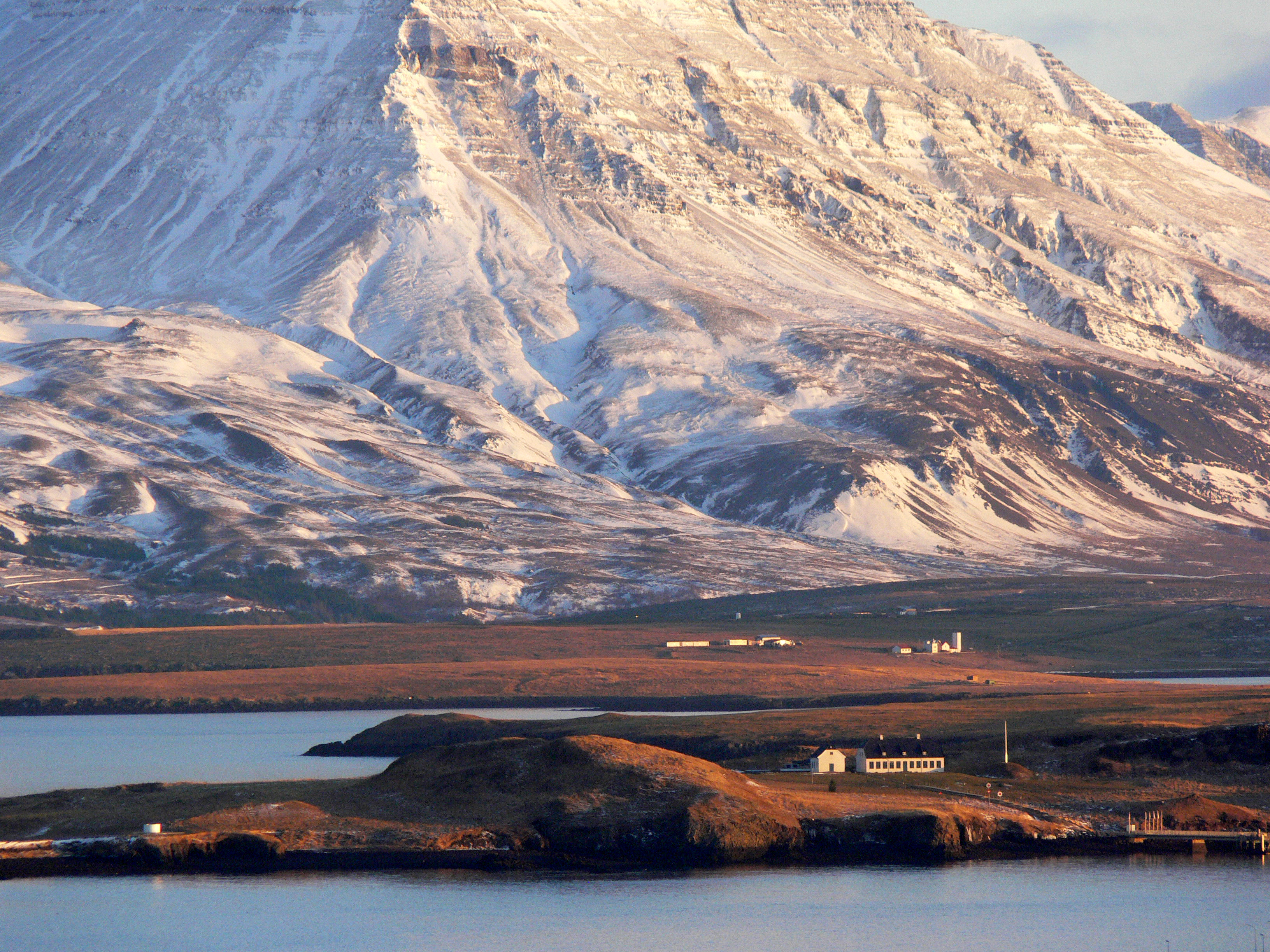 Viðey von der Hallgrímskirche aus.